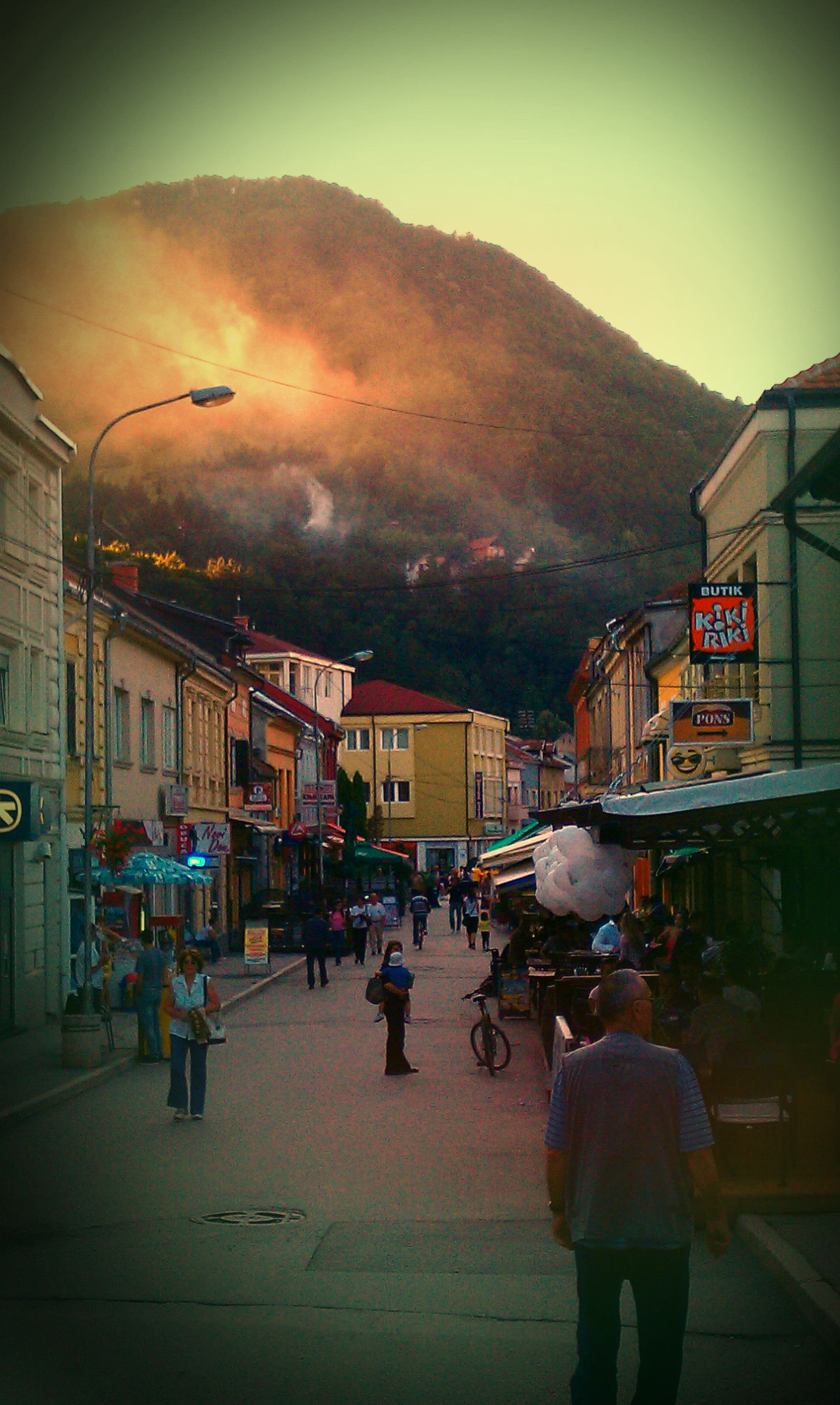 Ivanjica 2011